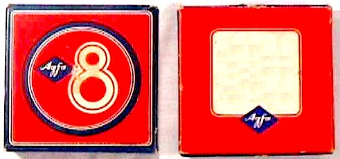 Película de 8 mm marca Agfa